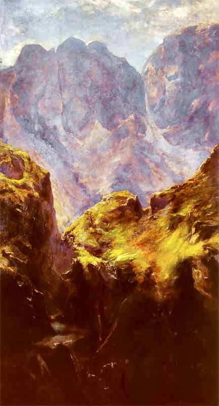 Aleksander Mroczkowski, "Zawrat", 1905, olej na płótnie, 114 x 62 cm, Muzeum Tatrzańskie, Zakopane